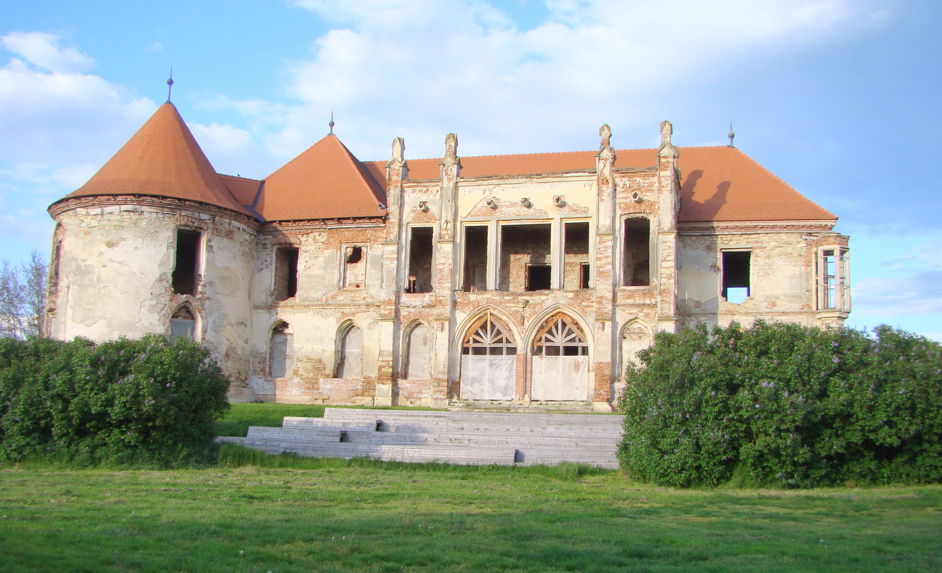 Corpul 3 al castelului, sat Bonțida; comuna Bonțida 03